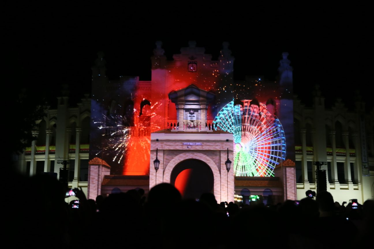 Espectaculo de luz sobre la plaza de toros de Albacete en su centenario. Feria de Albacete